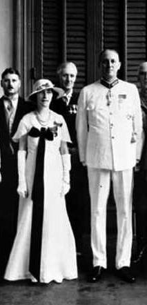 The image here is claimed to be in public domain as it is: A portrait of one of Hong kong's most famous politicians; There are no copyleft alternatives of such a photo; The image used is of a ceremonial and not a commerical value; The article is greatly improved by the prominence of this photo; Which is hosted and displayed on the not-for-profit Wikipedia Encylopedia for educational purposes. The person in the photo died in 1957 and 1960 therefore the copyright has expired. { }